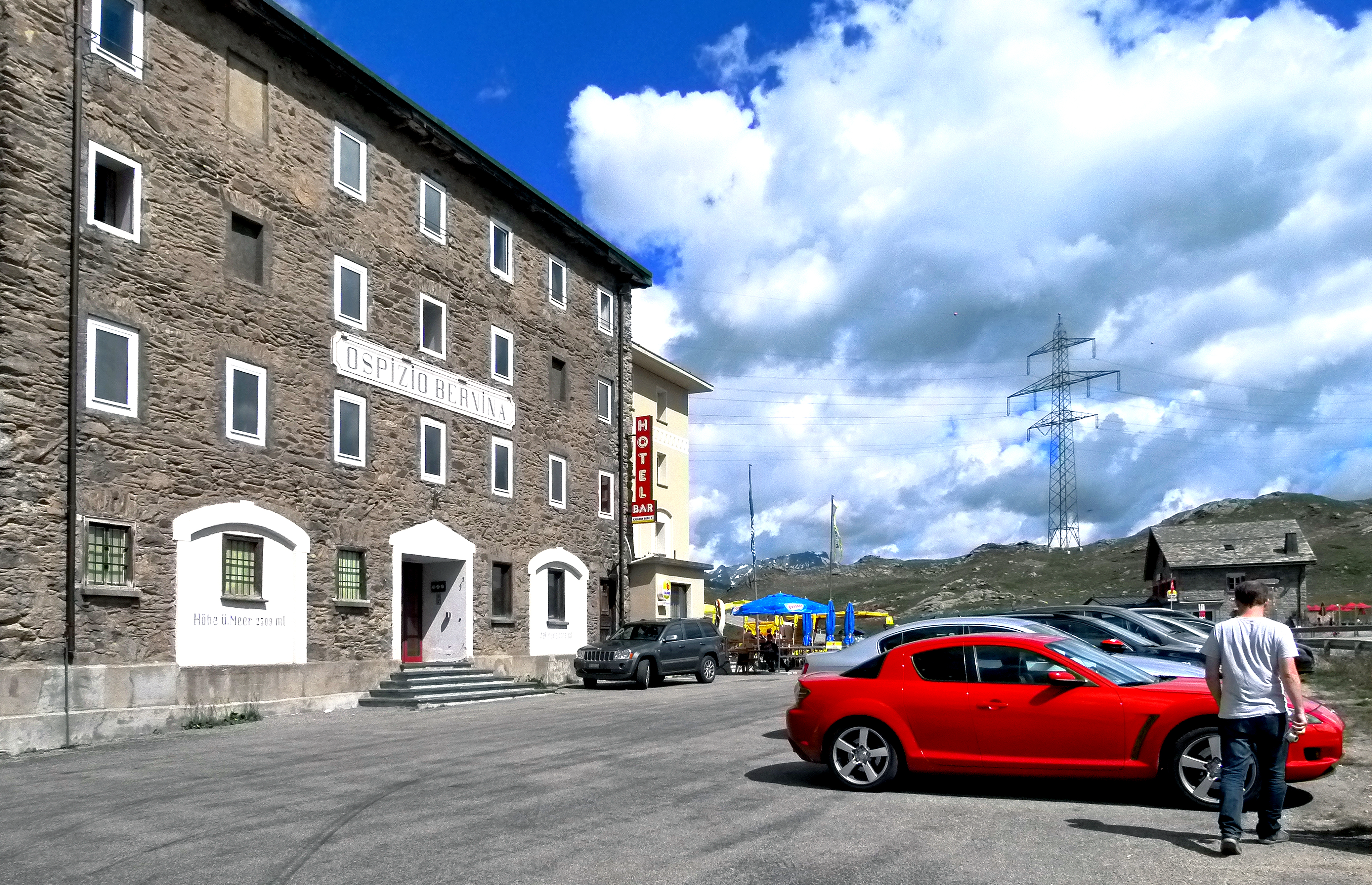 Bernina-hágó, Svájc